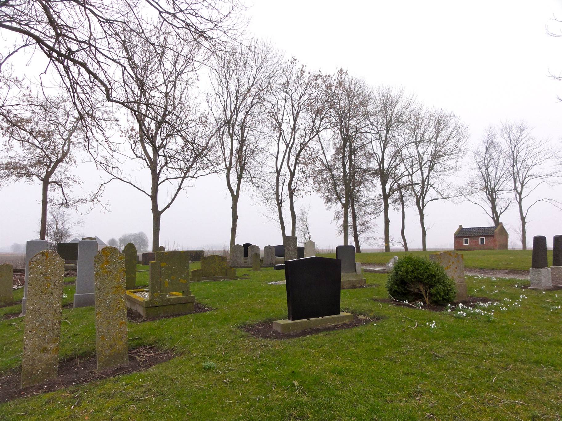 Begraafplaats Wierhuizen nabij Pieterburen